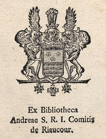 Anderas von Riaucour, sächsischer Gesandter in Mannheim, Exlibris